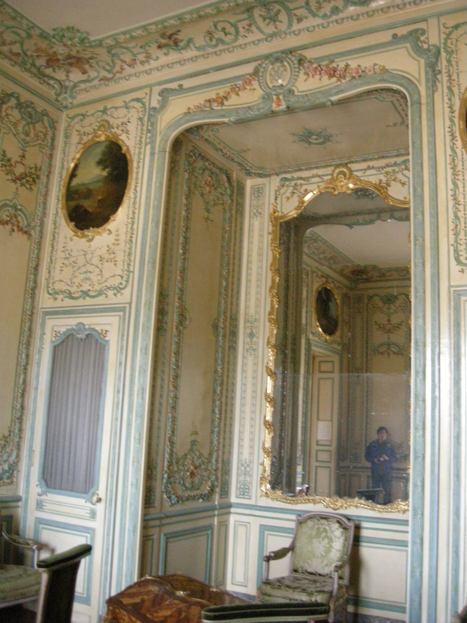 Boiseries au naturel en vernis Martin avec dessus-de-porte de Jean-Baptiste Oudry faisant partie des Quatre saisons, 1749, peints pour cette pièce. Cabinet intérieur de la Dauphine, Appartement de la Dauphine, Château de Versailles